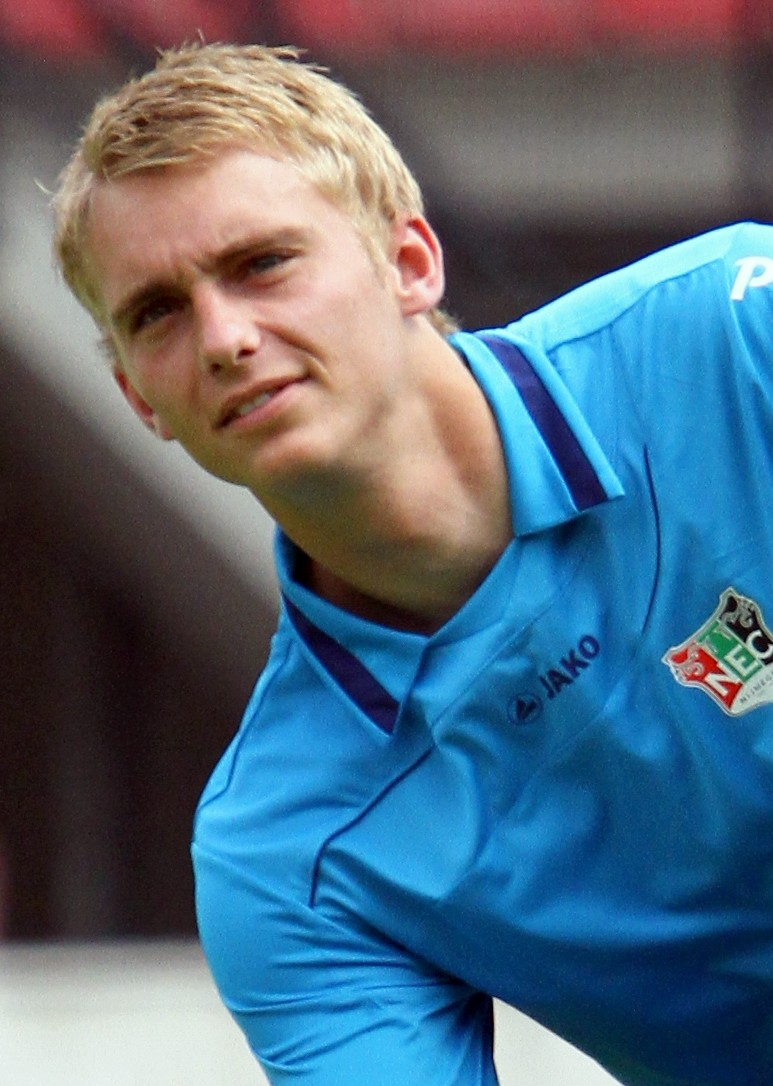 Jasper Cillessen - keeper van NEC